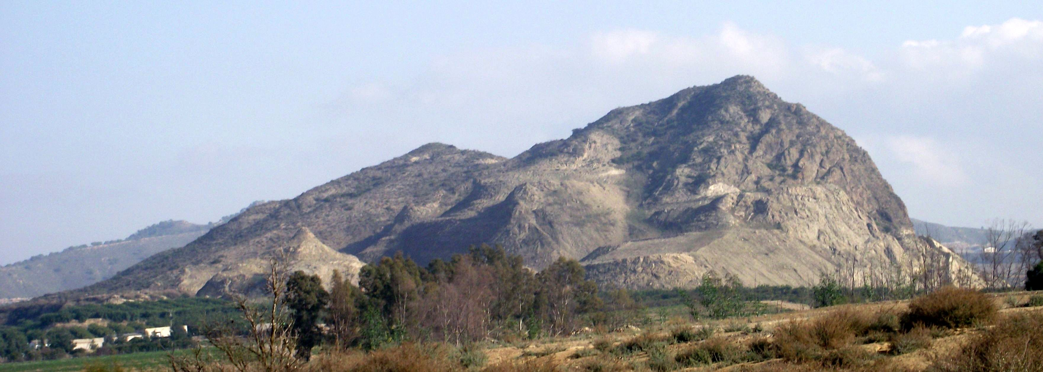 Vista desde el norte del volcán Cabezo Negro de Zeneta (Murcia)